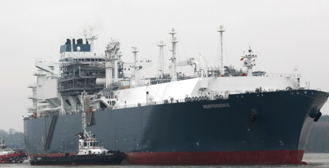 SGD Laivas ,,Independence""